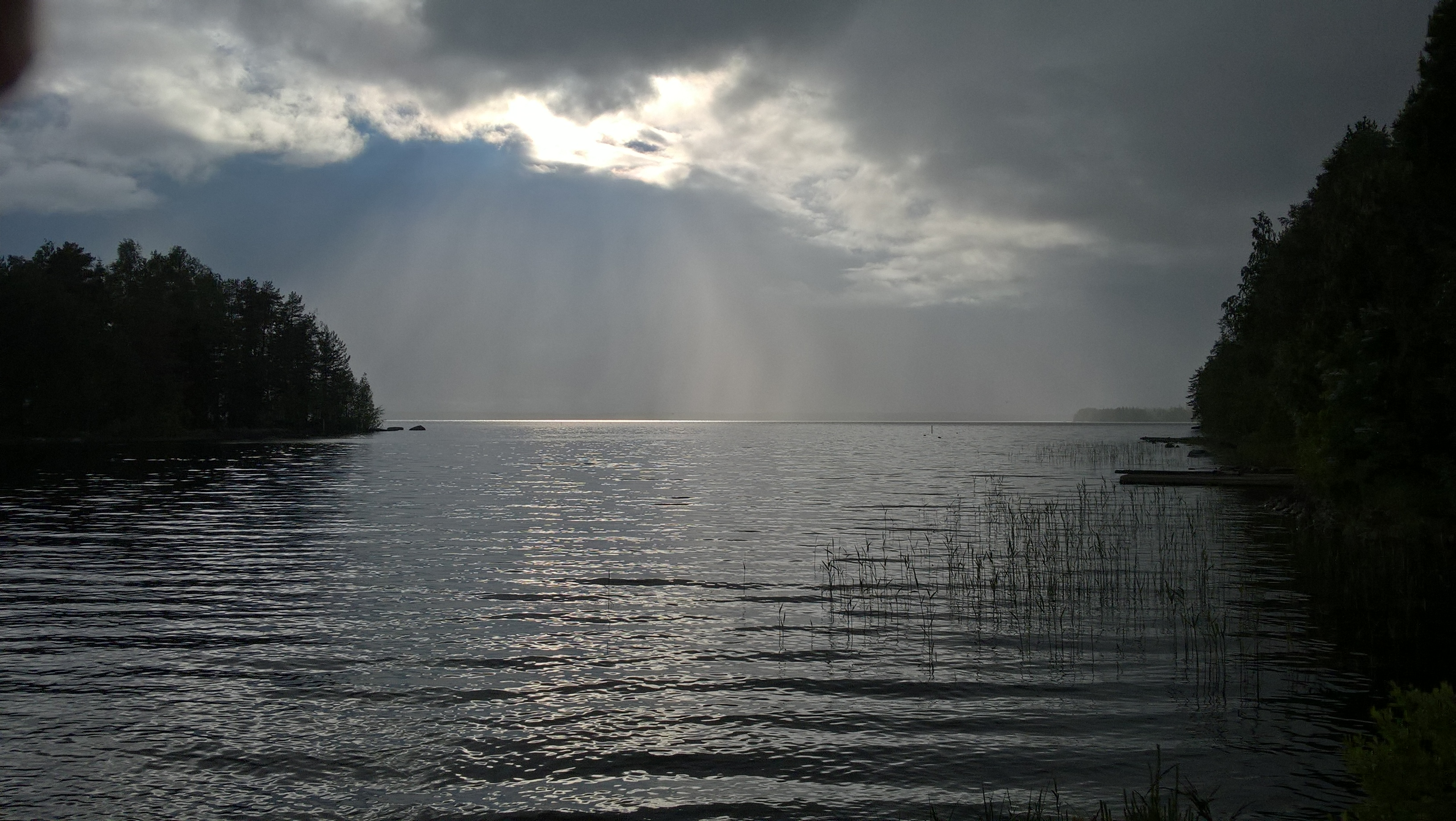 Kuva Kivijärvestä Lokakylän satamasta.